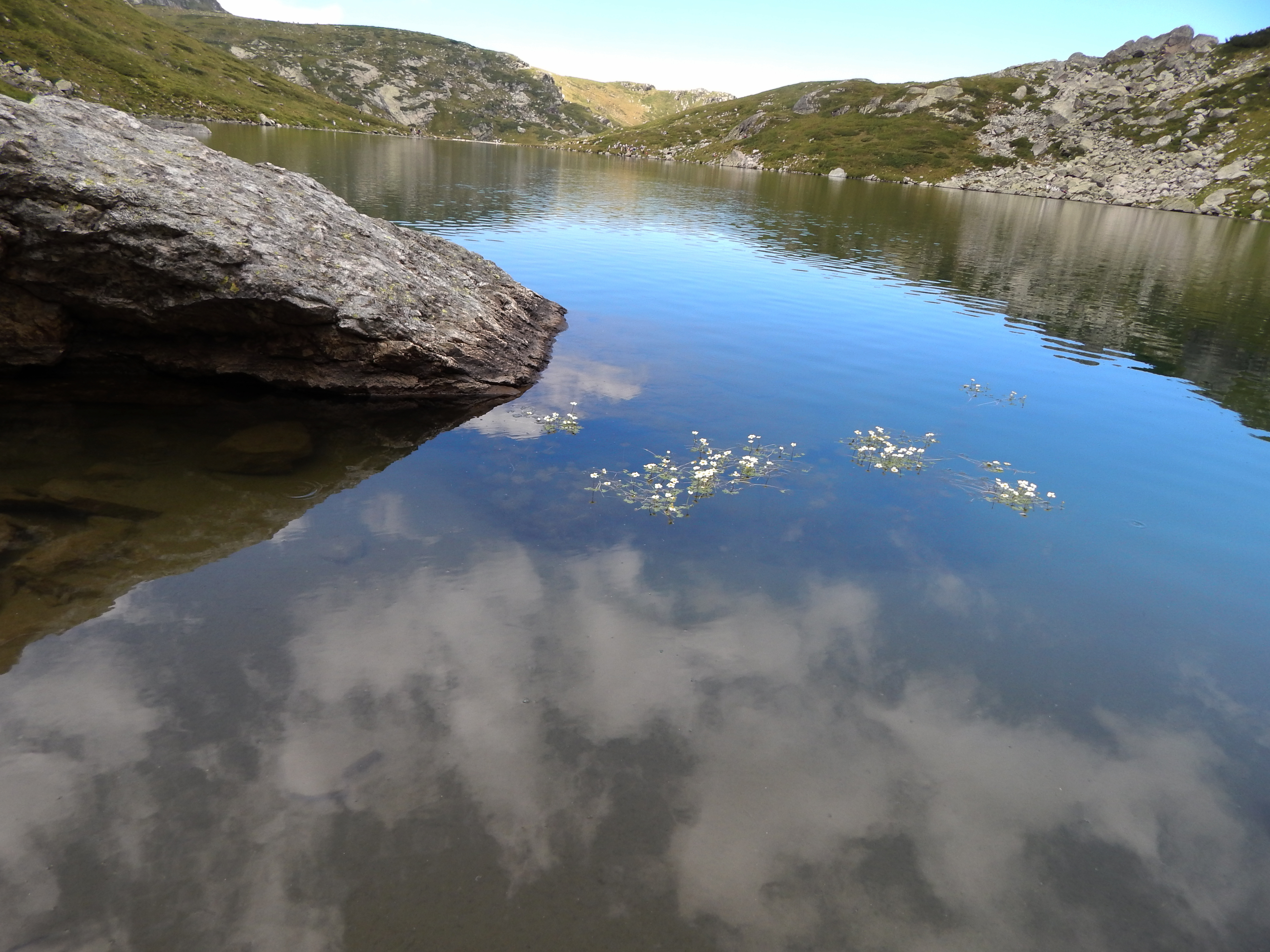 Рила, Рила